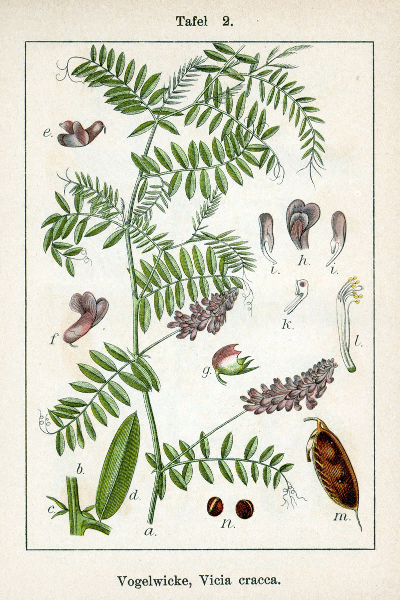 Vicia cracca L. s. str. Original Description Vogelwicke, Vicia cracca